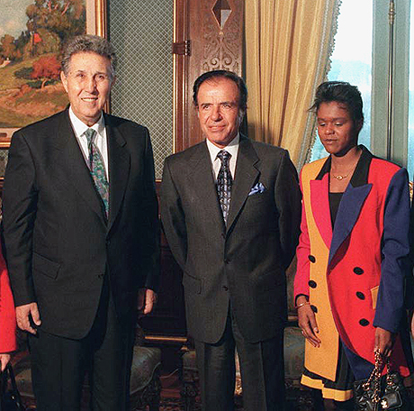 El presidente Carlos Menem recibió al ex presidente de Argelia, Ahmed Ben Bella, en su despacho de la Casa de Gobierno.